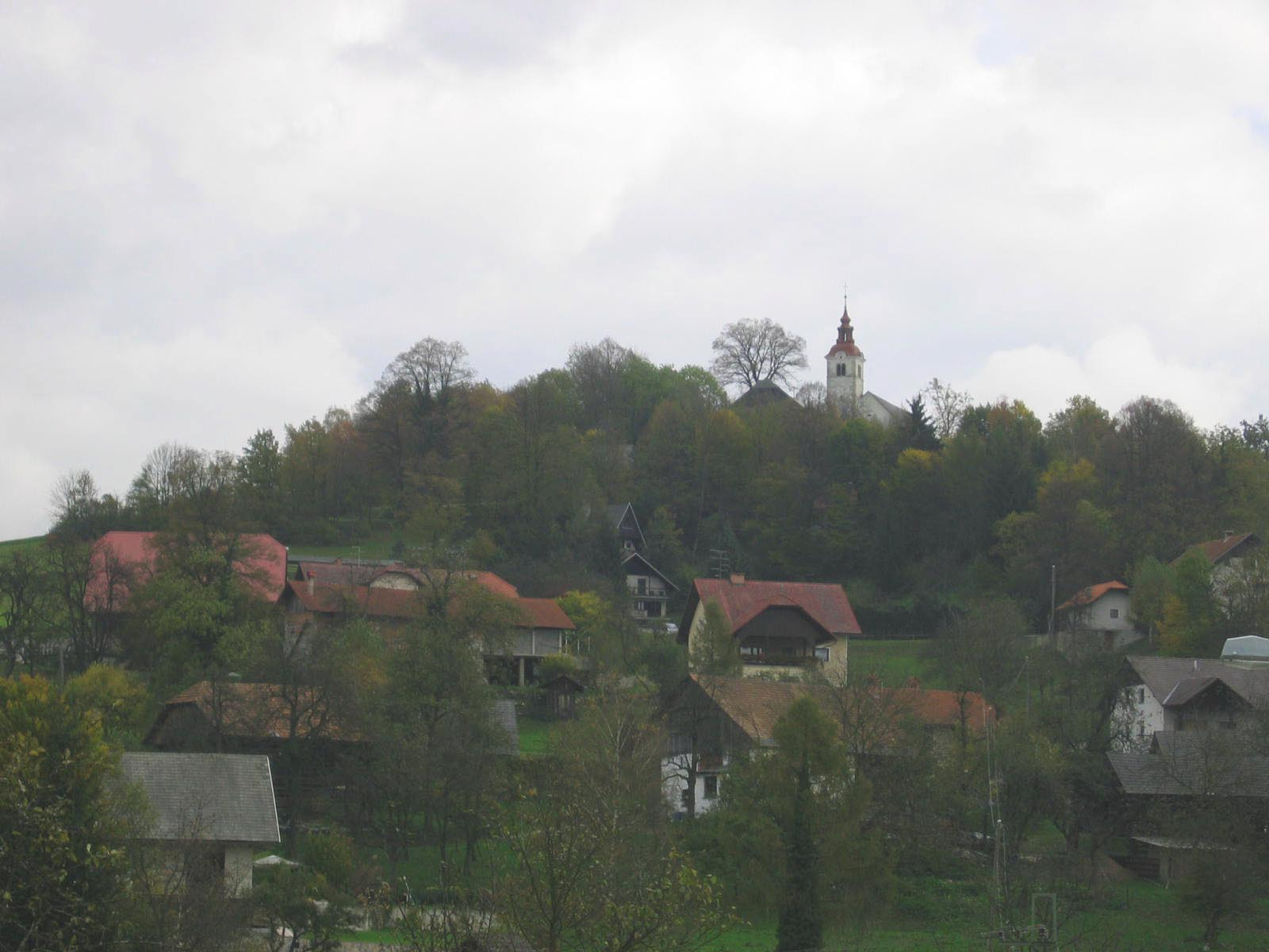 Sveta Trojica, village in Slovenia (near Domžale) photo:Ziga 16:52, 20 February 2007 (UTC)